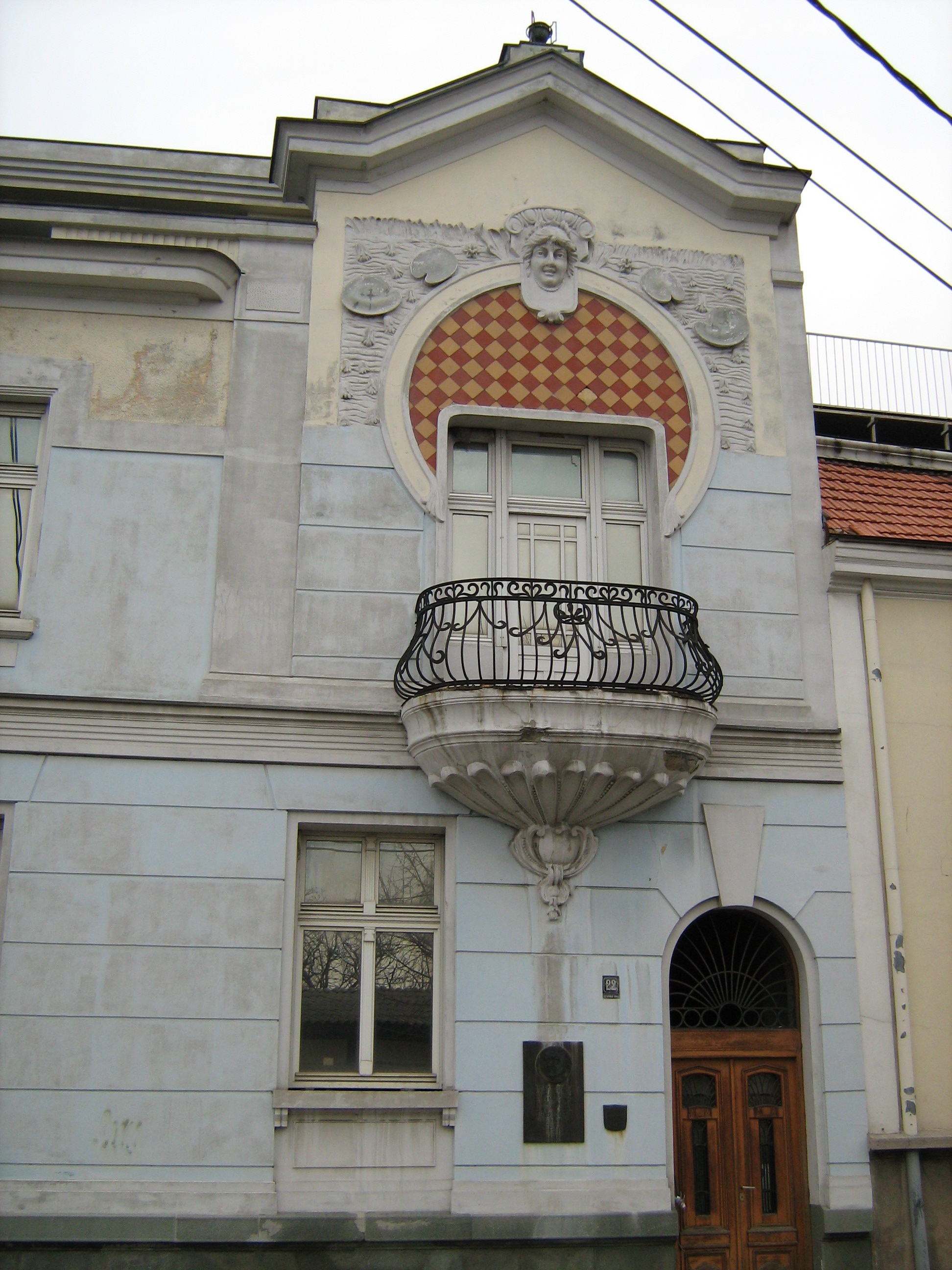 кућа Мике Аласа